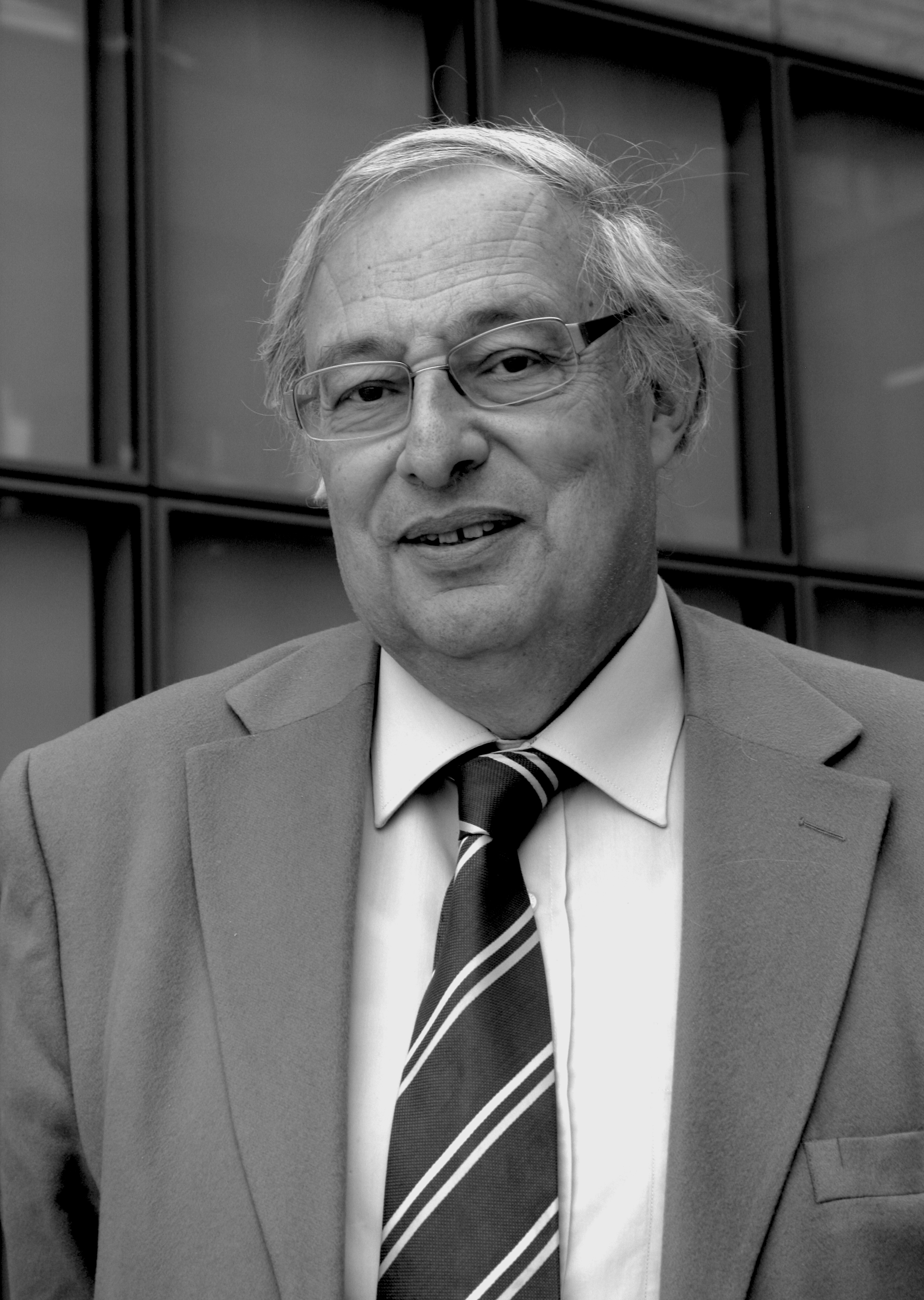 Bertrand Badie, né le 14 mai 1950 à Paris, est un politologue français spécialiste des relations internationales. Il est professeur des Universités à l’Institut d’études politiques de Paris et enseignant-chercheur associé au Centre d’études et de recherches internationales (CERI).